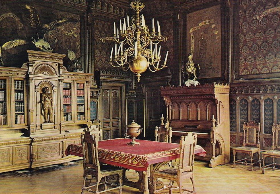 Huset uppfördes 1885 som sommarhus för byggmästaren Jöns Peter Holmberg från Stockholm efter ritningar av arkitekt Ernst Haegglund. 1966 revs villan för att ge plats åt Scania-Vabis personalbostäder. Matsalen och verandan bevarades och skänktes till Torekällbergets museum